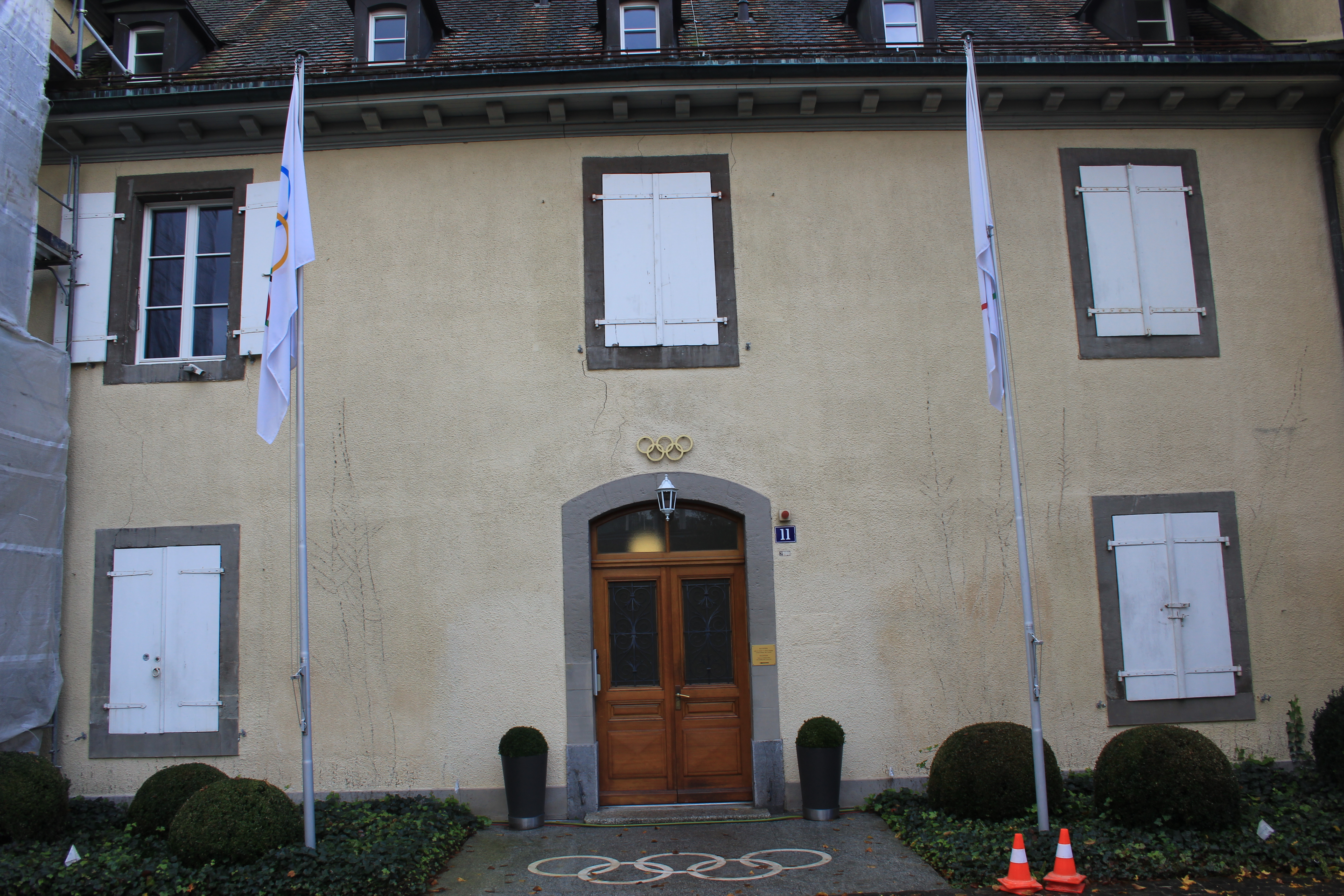 Ancien siège du CIO - Lausanne - Novembre 2013